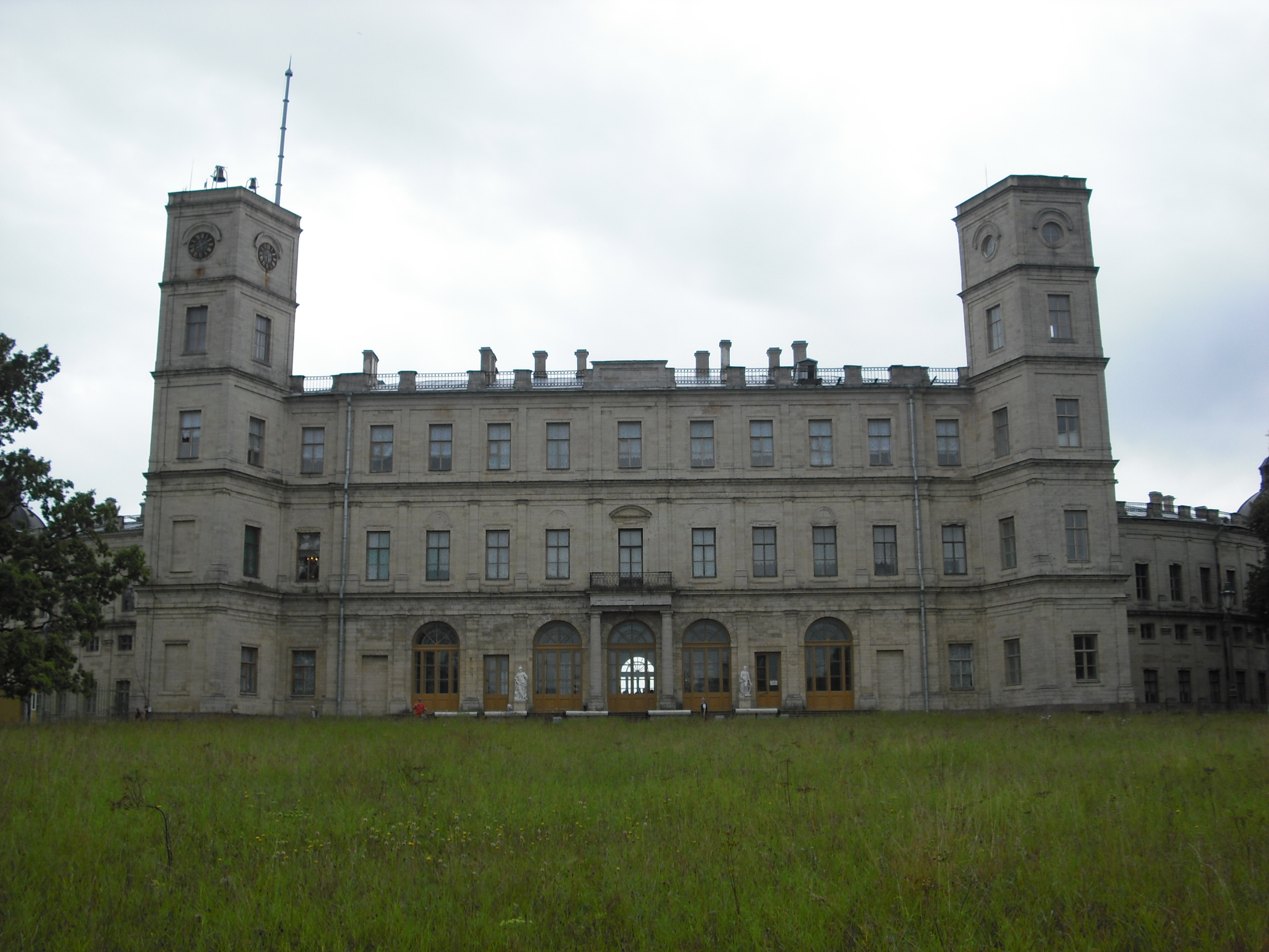 Гатчинский дворец, северный фасад